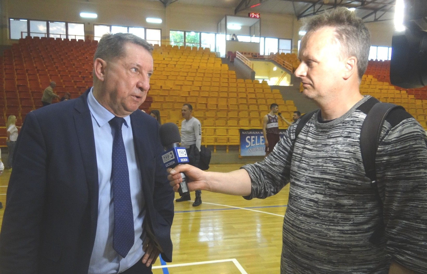 Trener Krzysztof Koziorowicz (29.04.2018)